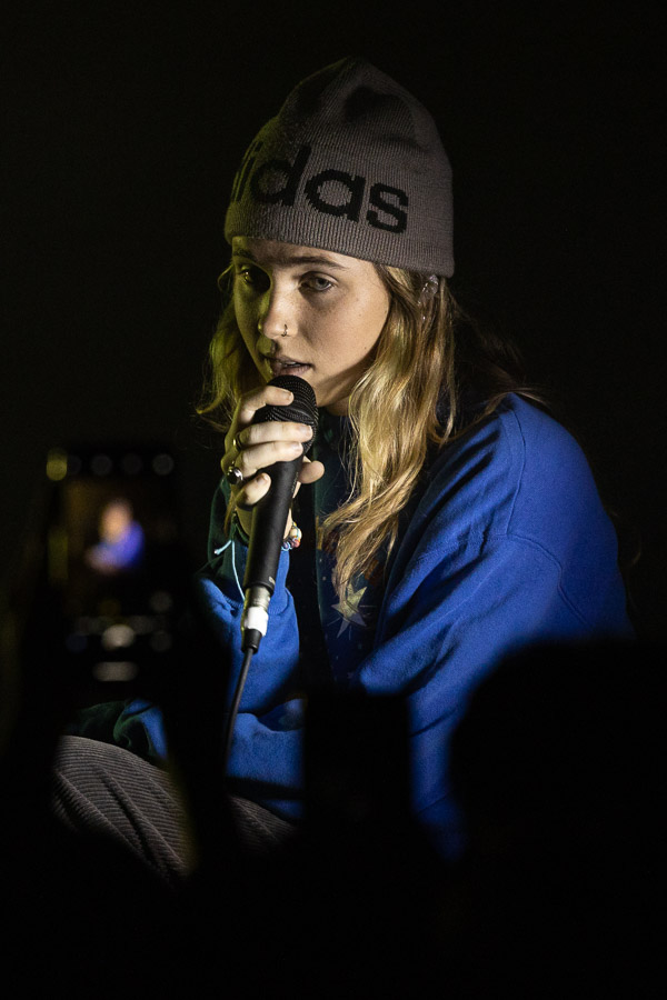 The American singer-songwriter Clairo on stage at Parkteatret in Oslo December 22, 2019.